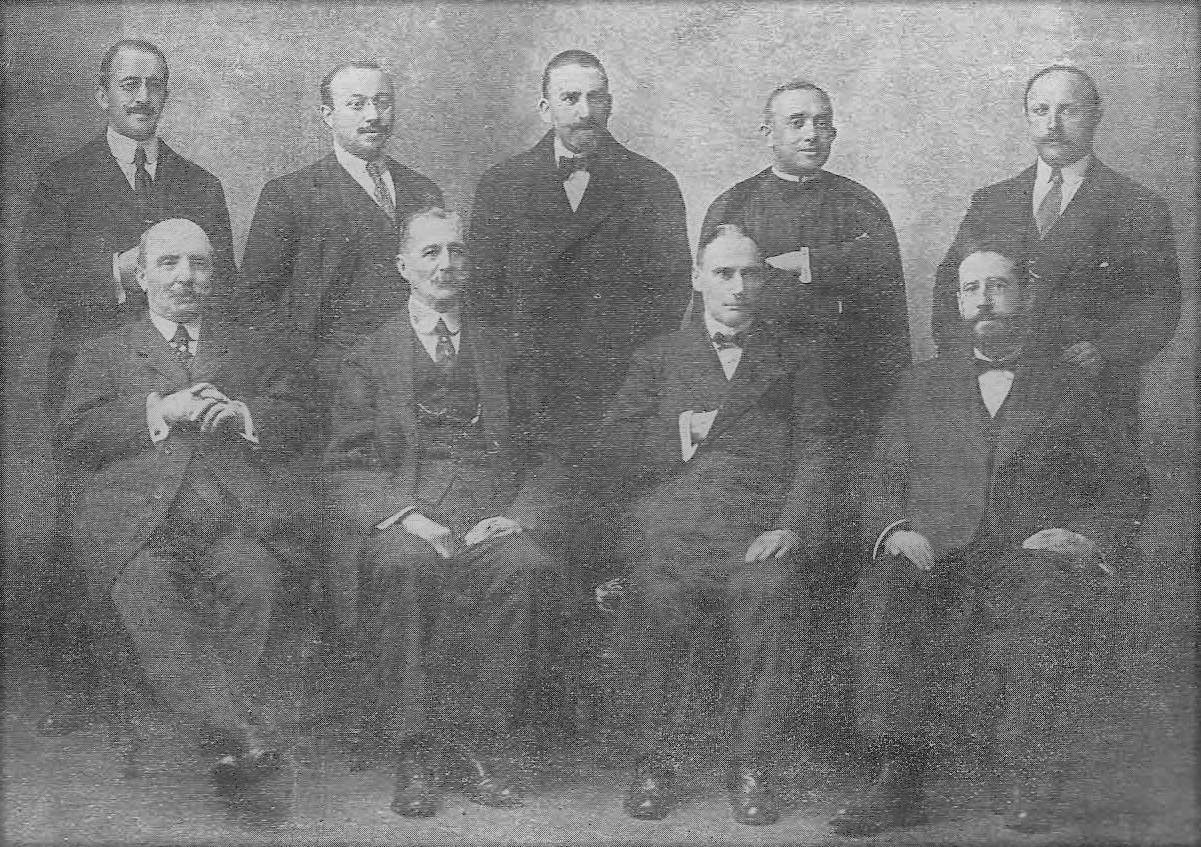 Comisión ejecutiva del homenaje: De pié (de izquierda a derecha): Antonio Losada Diéguez, José Osorio Martínez, Julio A. Cuevillas, Emilio Vázquez Pardo y Jesús Soria González. Sentados: Manuel Cambón Fraga, Antonio Gaite Lloves, Benito Fernández Alonso y Emilio Amor Rolán.